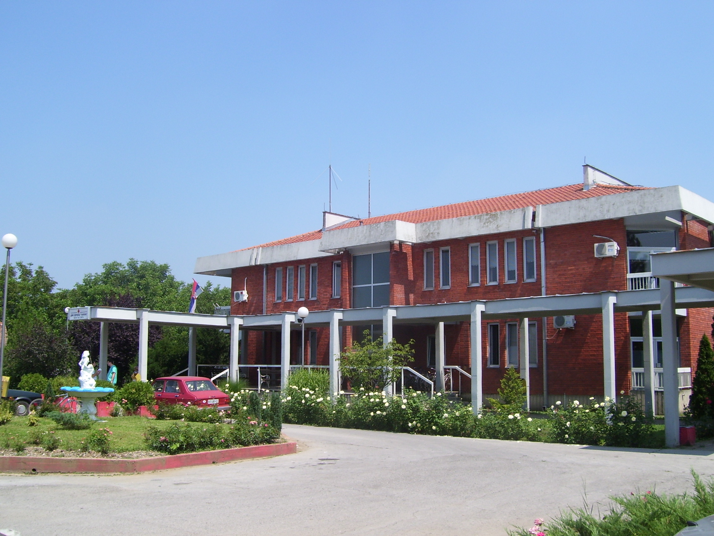 Аутор слике је корисник:SRB Maric IT Слика је урађена обичним фотоапаратом. Датум: 24-07-2010.